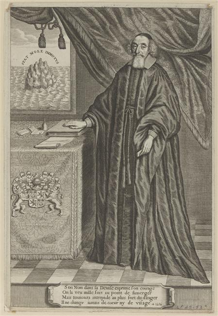 Portrait de Mathieu Molé (1580-1656), Premier président du Parlement de Paris puis chancelier de France